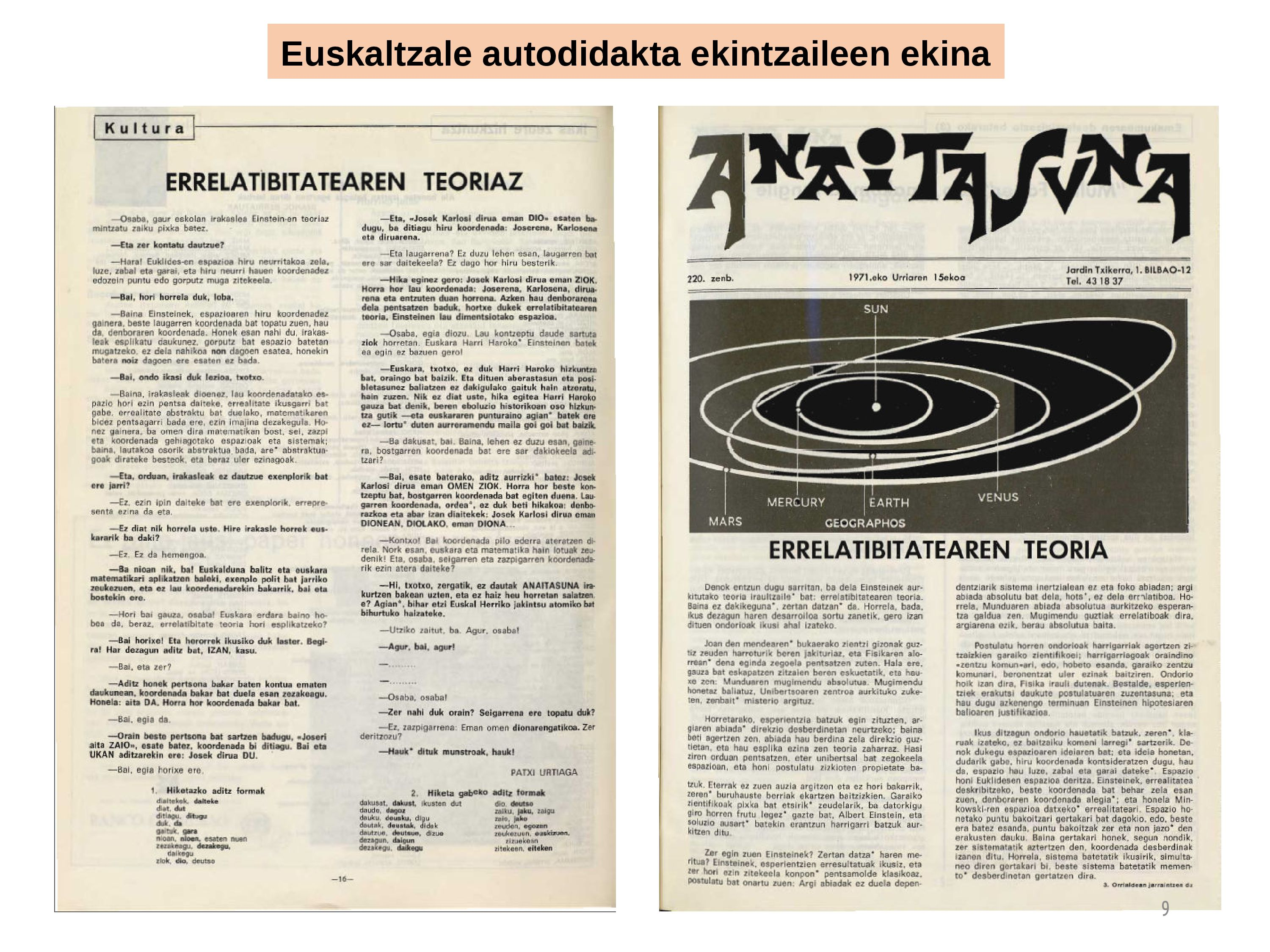 Anaitasuna Aldizkaria, euskaltzale autodidakten bilgunea. Euskara Batuaren helduaroa Jardunaldiaren barruan (Gasteiz, 2018-06-21). Jose Ramon Etxebarriak bere hitzaldian euskarazko testugintzan bere helburuak, lanak eta bidelagunak aipatu zituen (Euskarazko testugintza. Amaitu gabeko historiaren atal baten bertsio pertsonala).